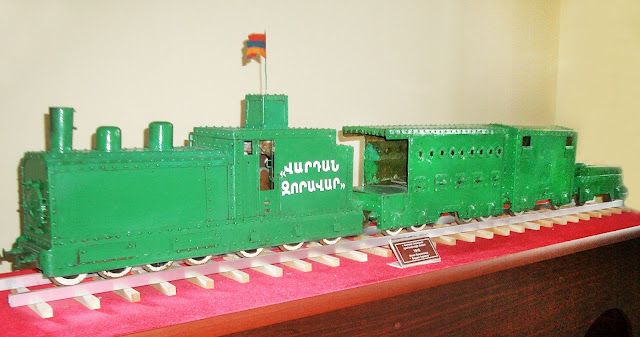 Vardan Zoravar,Վարդան Զորավար